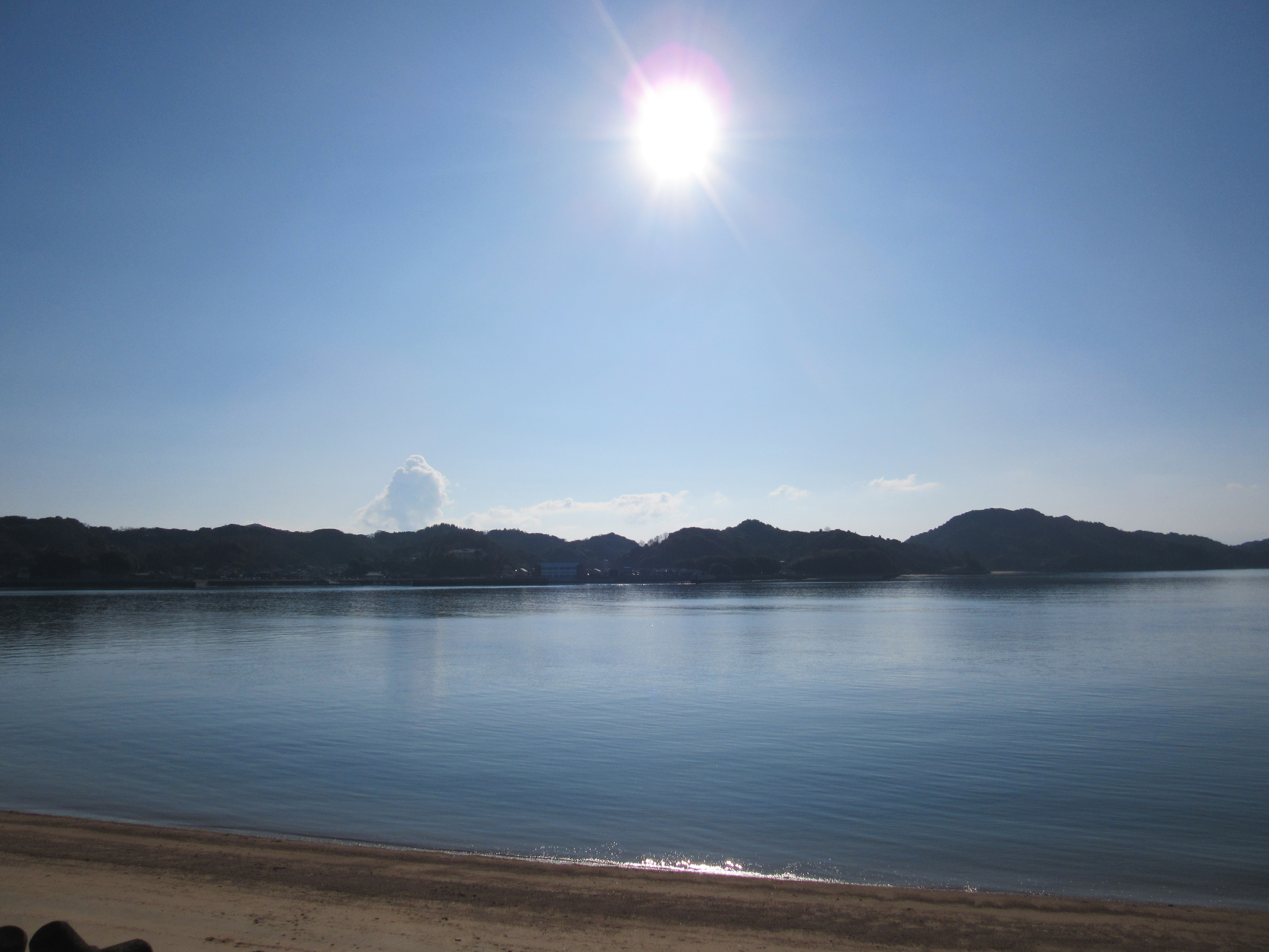 佐島全景。